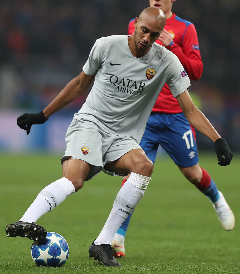 ЦСКА проиграл «Роме» в «Лужниках»